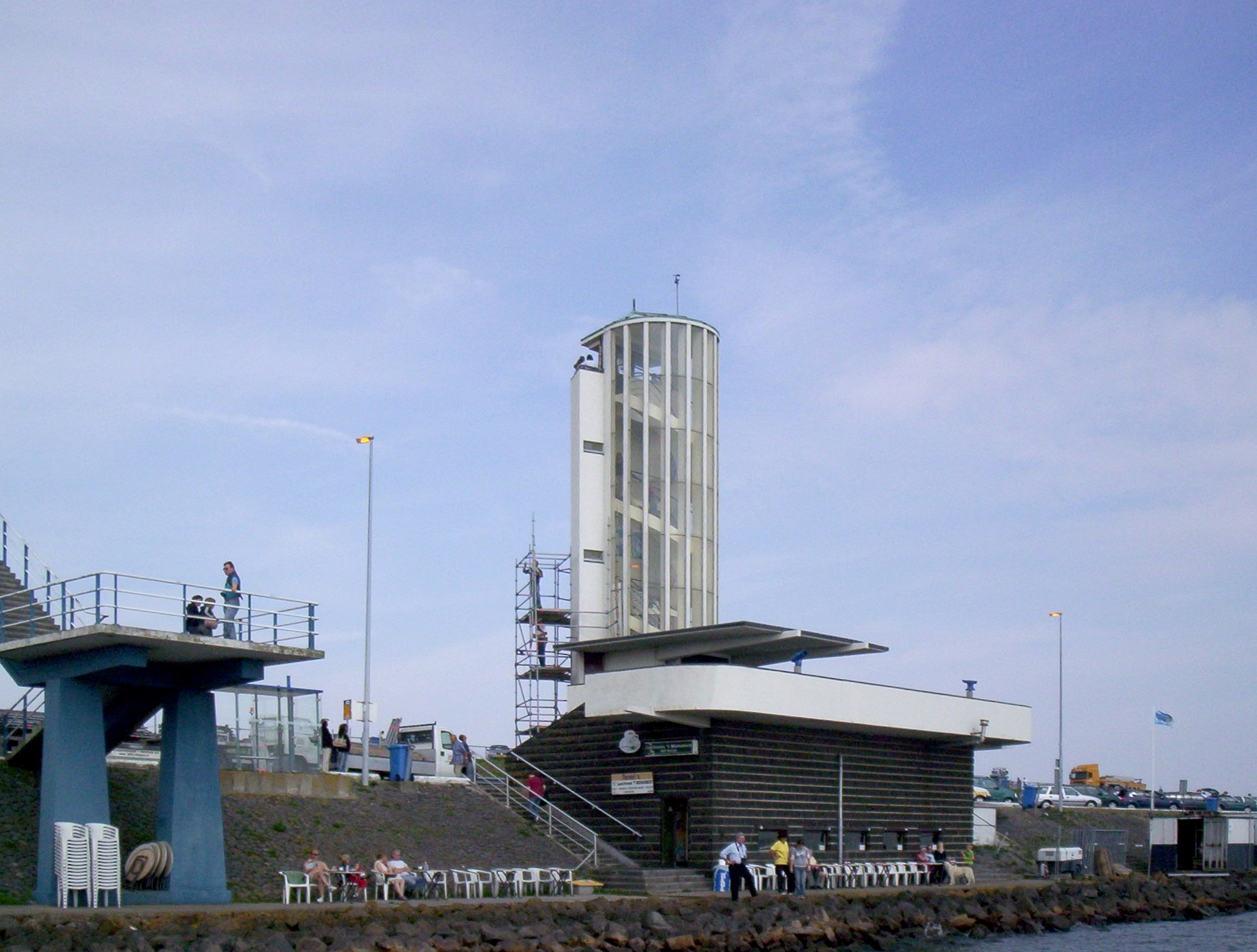 Afsluitdijk, lookout tower